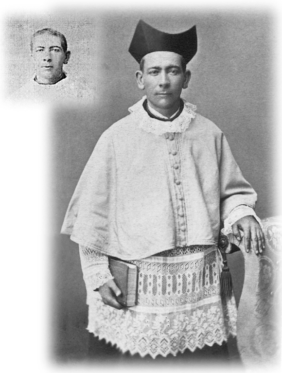 José Gabriel Brochero, sacerdote que realizó grandes obras de fomento de la población en la región de Tras las Sierras, Córdoba, argentina.